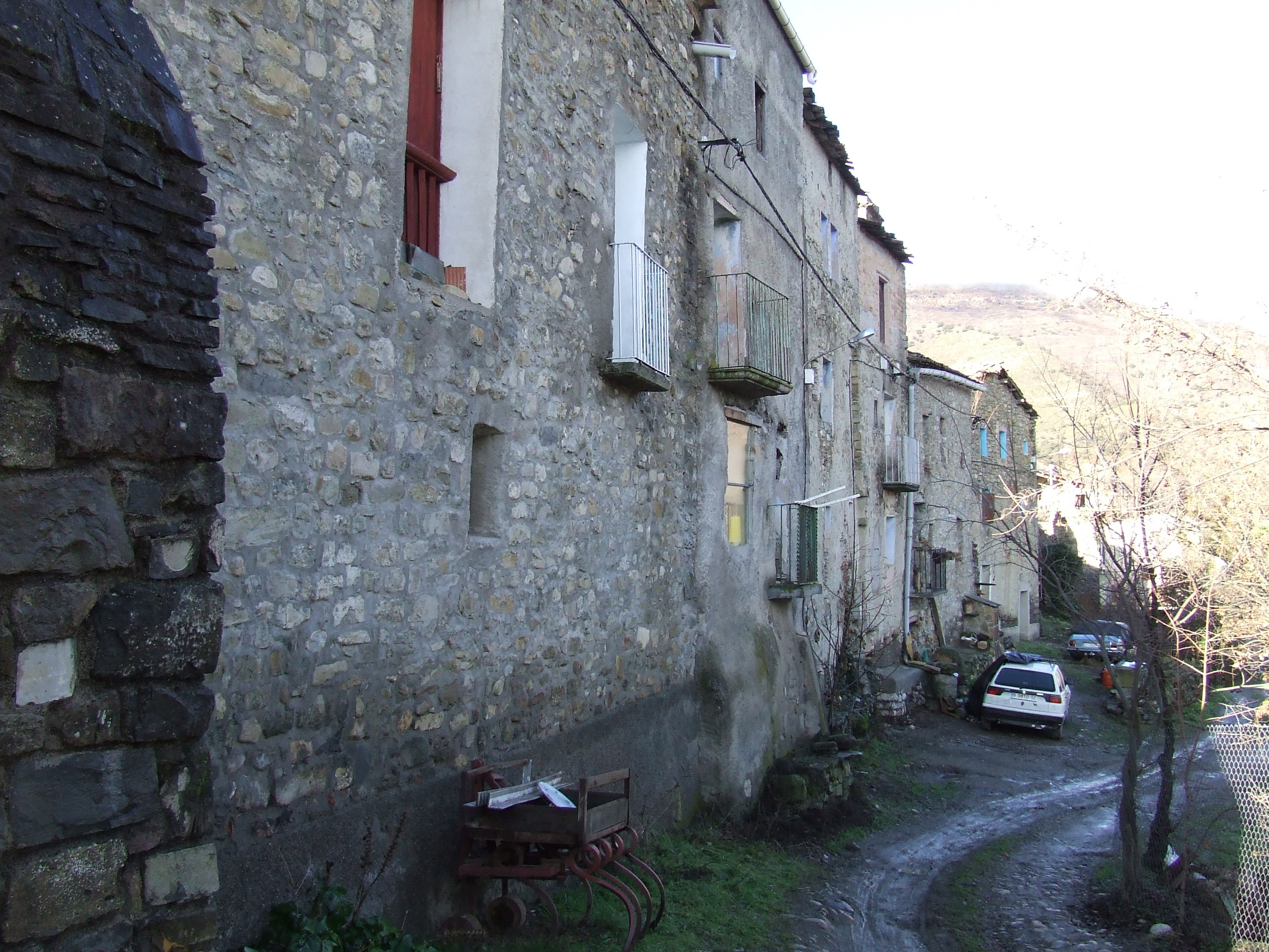 L'absis romànic de Santa Maria d'Eroles (Fígols de Tremp, Tremp, Pallars Jussà)